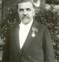 Claude Lebois, décoré de la Légion d'honneur, 1898